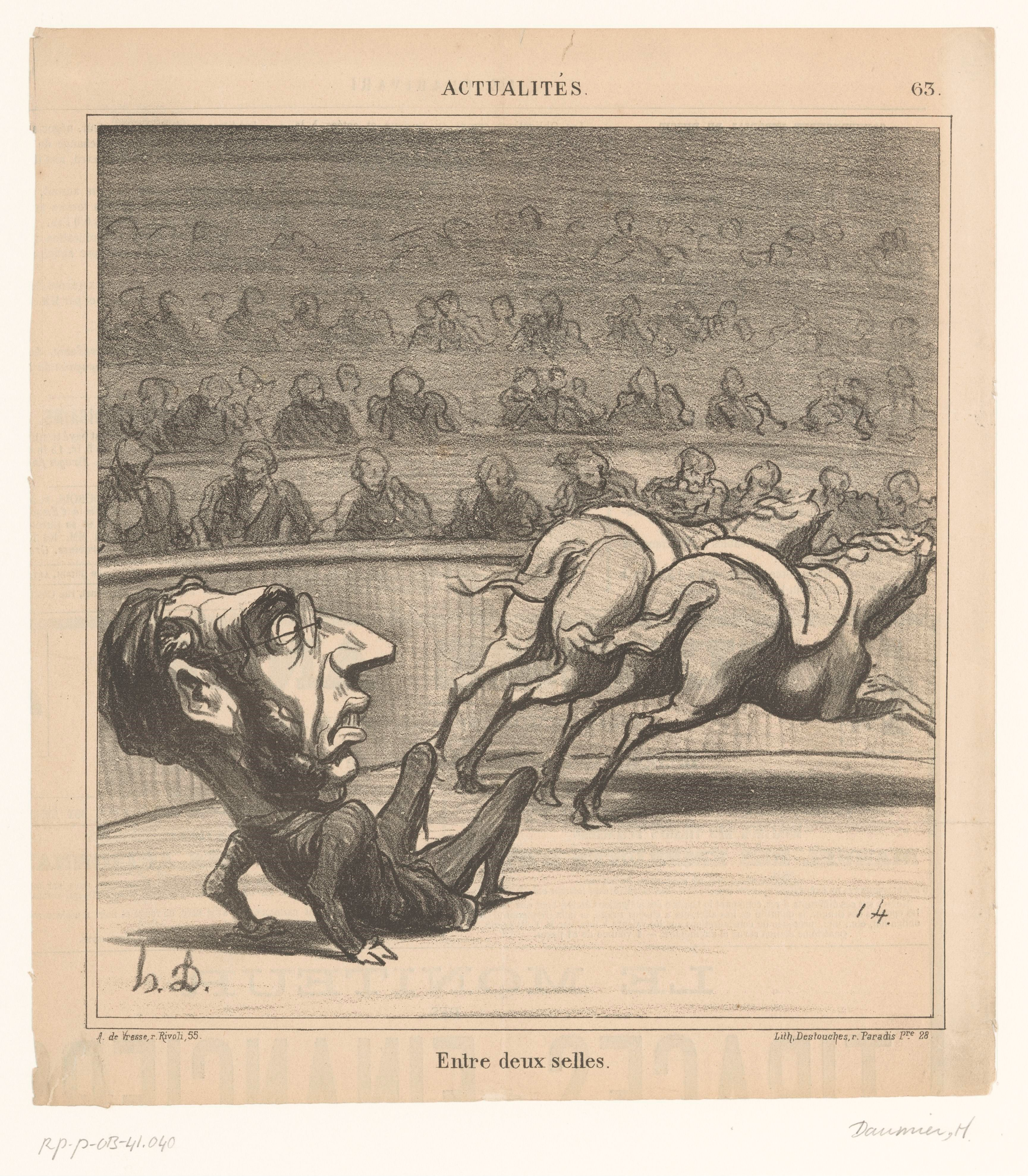 IdentificatieTitel(s): Karikatuur van de politicus Émile Ollivier als gevallen ruiterEntre deux selles (titel op object)Actualiteiten (serietitel)Actualités (serietitel op object)Objecttype: spotprent Serienummer: 63/?Objectnummer: RP-P-OB-41.040Catalogusreferentie: Delteil (Daumier) 3705Opschriften / Merken: verzamelaarsmerk, verso, gestempeld: Lugt 2228aVervaardigingVervaardiger: prentmaker: Honoré Daumier (vermeld op object)drukker: Destouches (vermeld op object)uitgever: Arnauld de Vresse (vermeld op object)Plaats vervaardiging: ParijsDatering: 1869Materiaal: papier Techniek: lithografie (techniek)Afmetingen: blad: h 287 mm × b 257 mmToelichtingPrent gebruikt voor: Le Charivari, 15 april 1869.OnderwerpWat: caricatures (human types)political caricatures and satireshistorical personshorse-racingWie: Émile OllivierVerwerving en rechtenVerwerving: onbekend 2018Copyright: Publiek domein